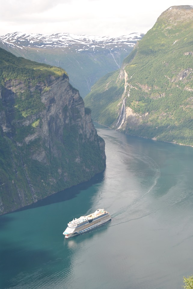 Blick vom Aussichtspunkt Ørnesvingen an der Adlerstraße auf den Geirangerfjord